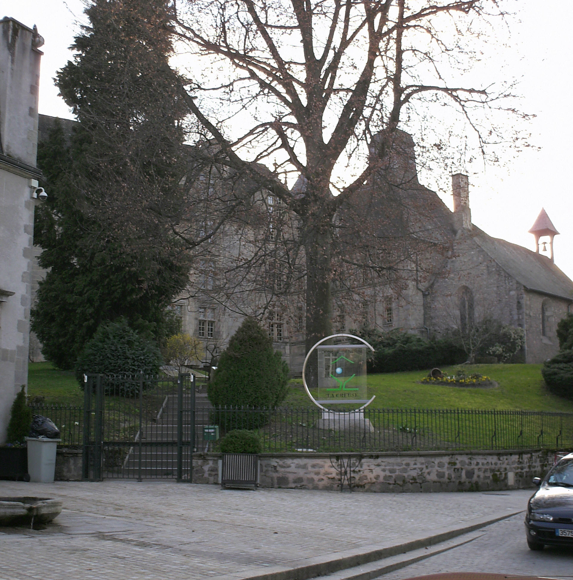 France - Région Limousin - Département de la Creuse (23) - Guéret - Palais Monéroux - Hôtel du Département de la Creuse